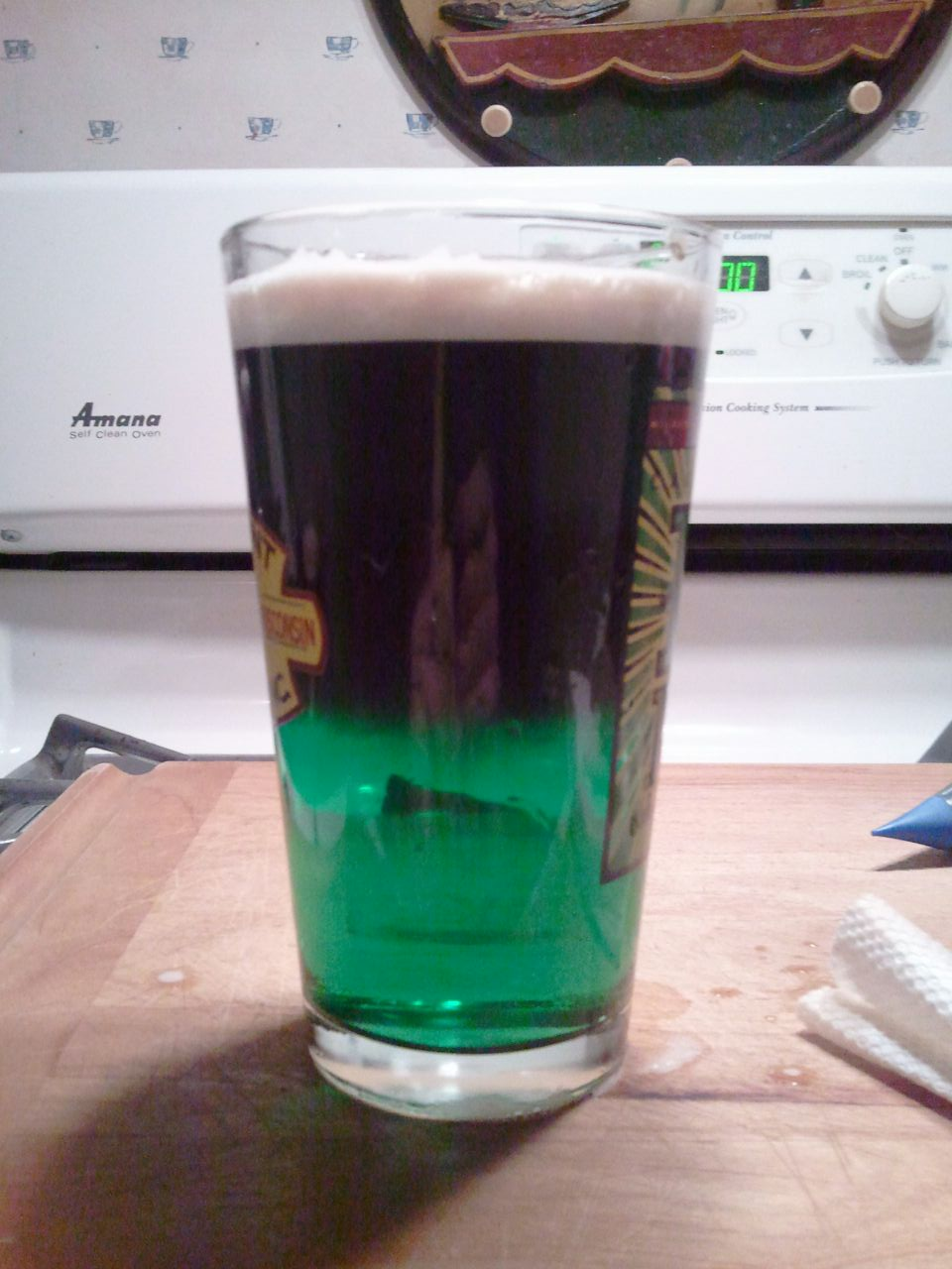 En ölmix gjord på Guinness och grönfärgad Pabst Blue Ribbon, vilken jag har döpt till Black Gremlin